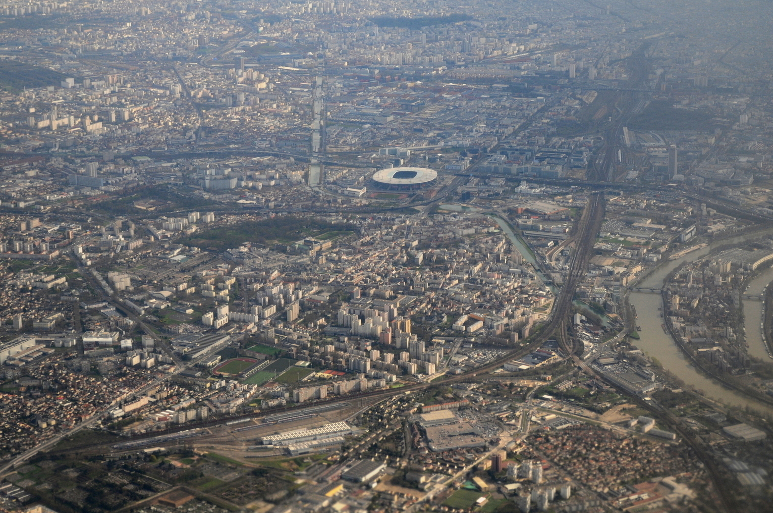 Vue aerienne du nord de Paris. On voit le stade de France au milieu de la photo.